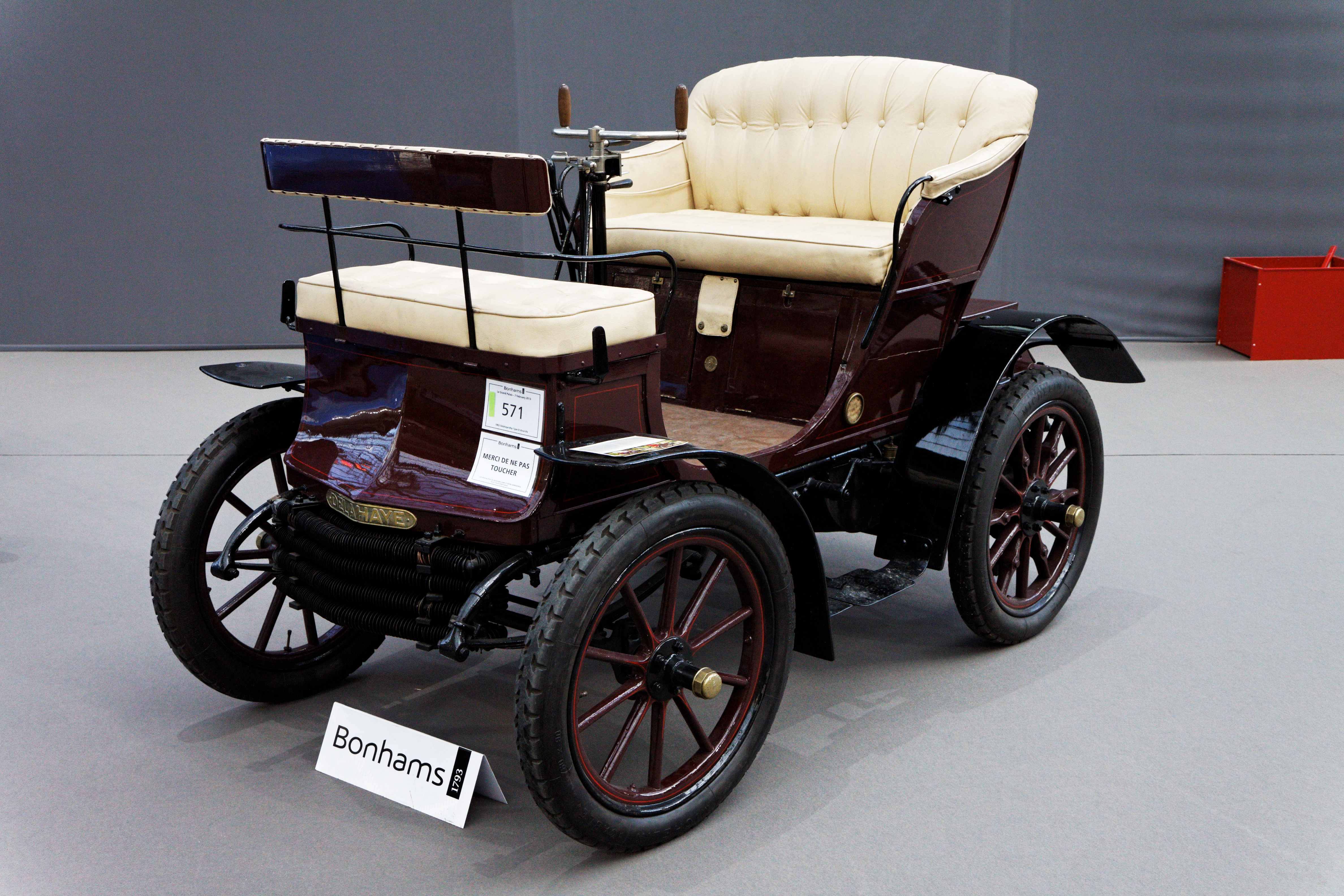 Une Delahaye 6HP Type O Vis-à-Vis de 1902.